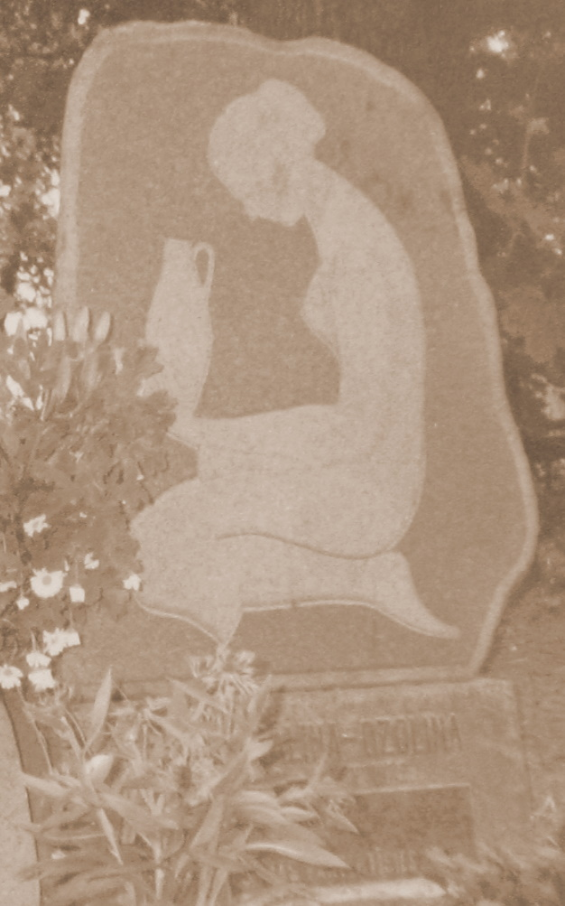 Marijas Ozoliņas kapa piemineklis